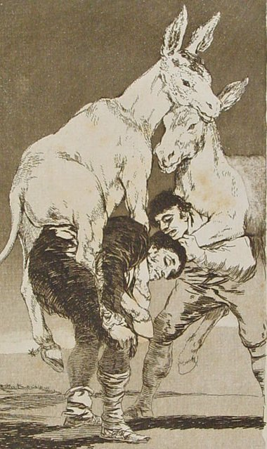 Tú que no puedes.-Detalle 1 del Capricho nº 42: Francisco Goya y Lucientes, Pintor de Goya, serie Los Caprichos